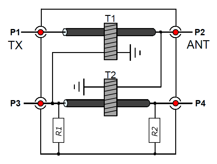 SWR-Brücke mit zwei identischen Stromwandlern nach Sontheimer-Frederick. R1 und R2 müssen den Wert des Wellenwiderstandes der Leitung P1-P2 aufweisen.